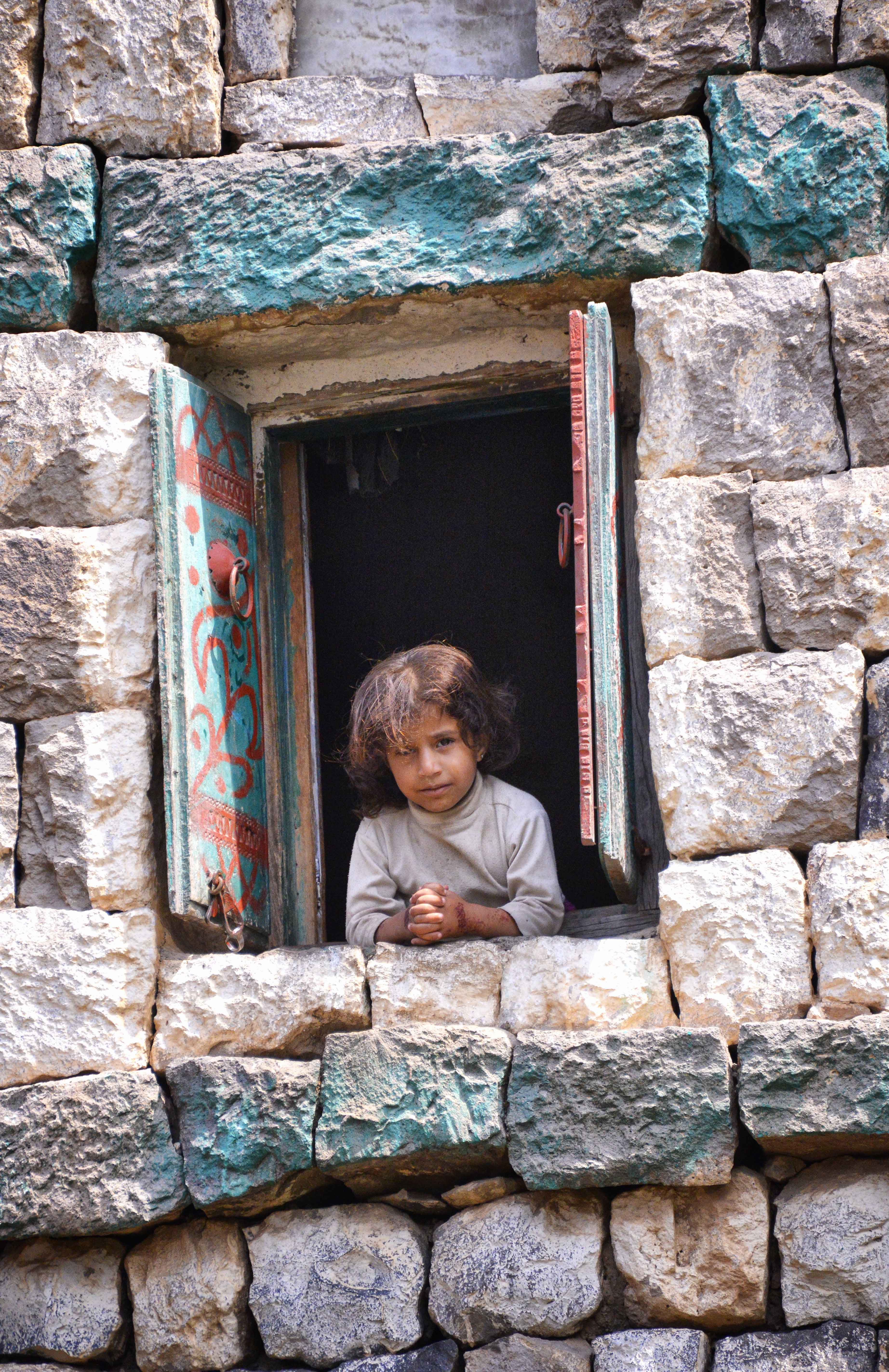 Yemen